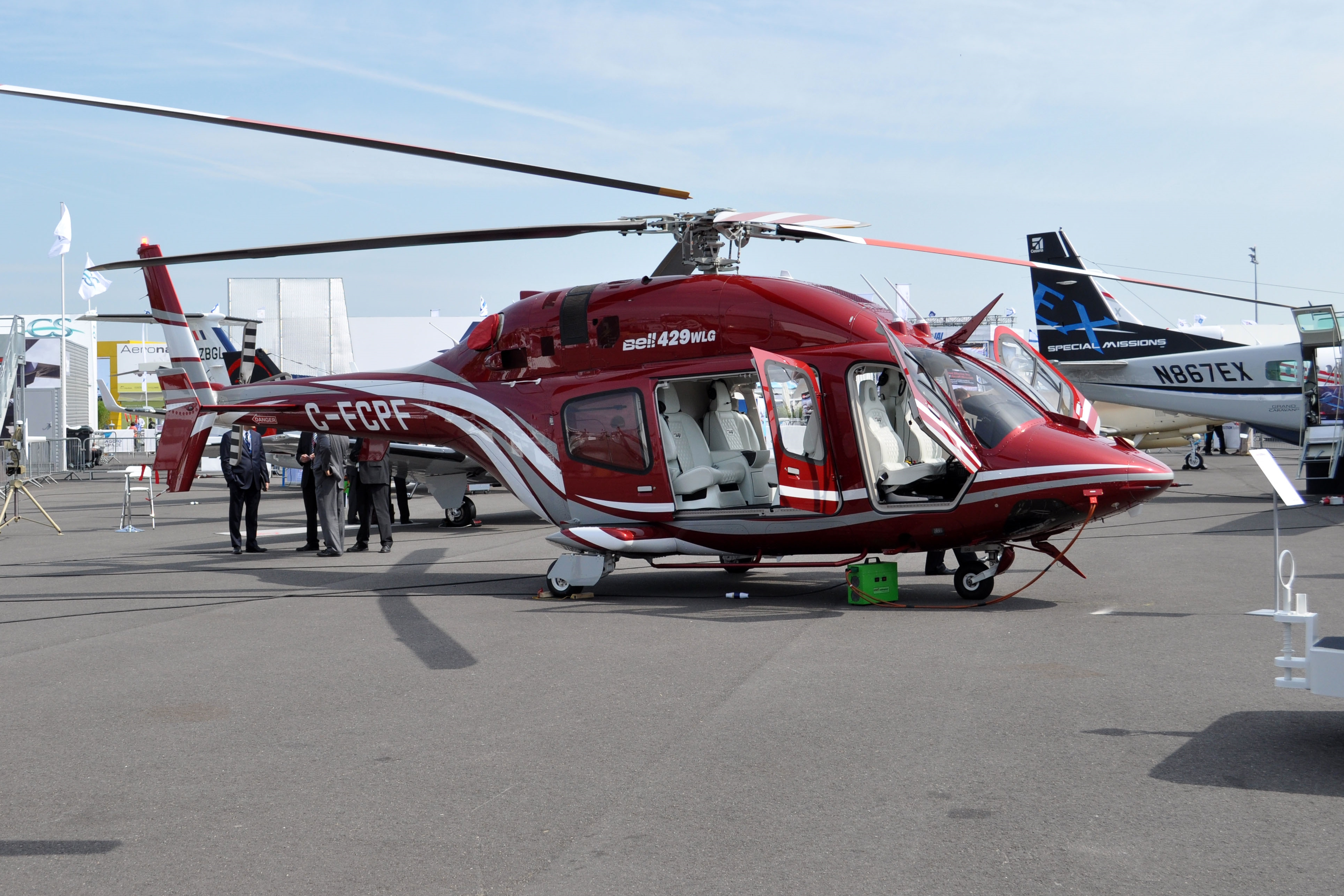 MSN 57211 BELL 429WLG BELL HELICOPTERE LBG AIRPORT SIAE 2015